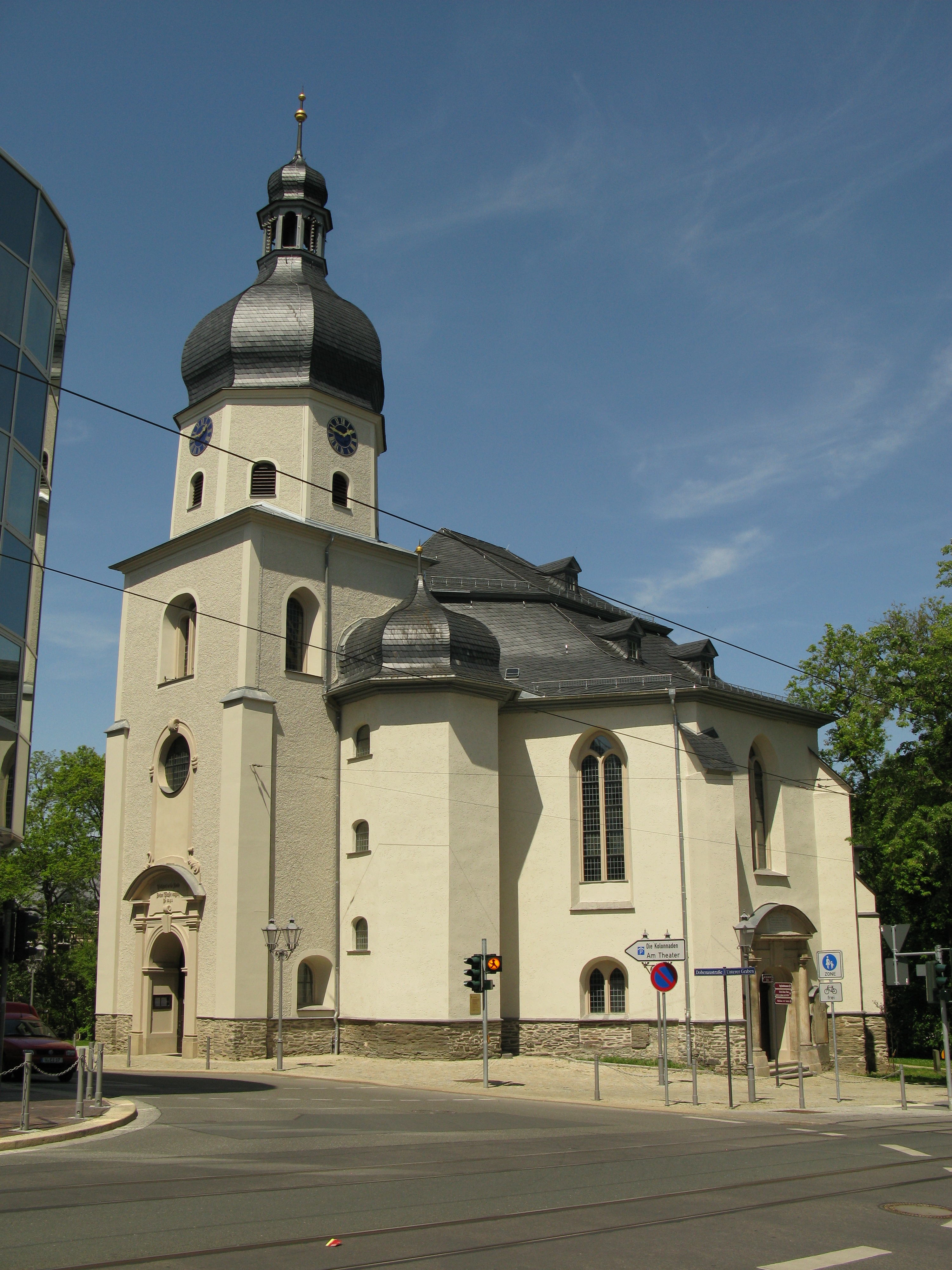 Plauen, die Lutherkirche nach der Sanierung (Dobenaustraße 2).